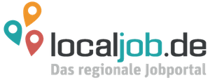 Logo (seit Februar 2016)